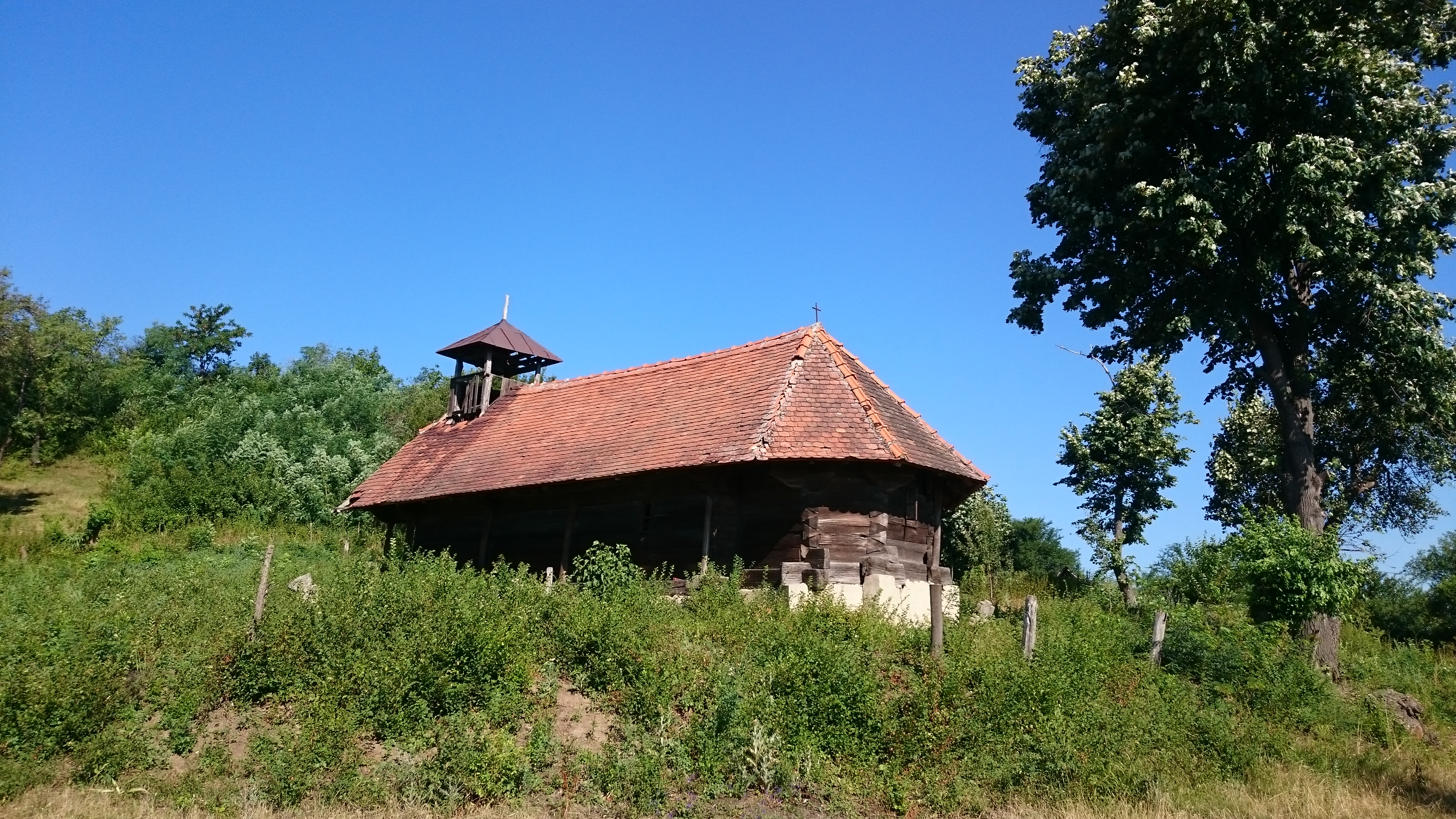 Iglesia de madera en Valea Ursului, distrito de Mehedinți, Rumania